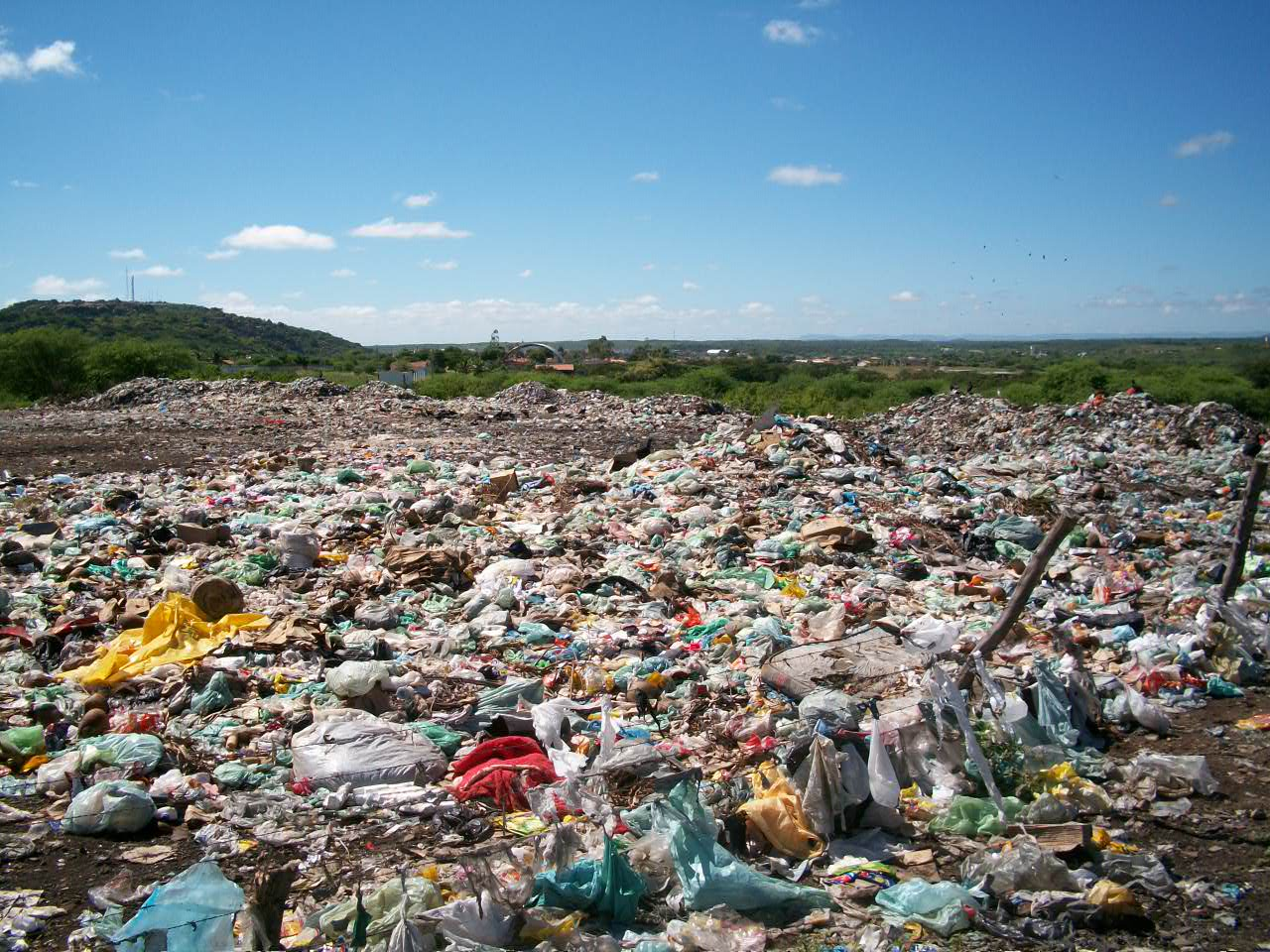 Lixão da Cidade- City Dump -Sumé-PB Ugly & Dirty